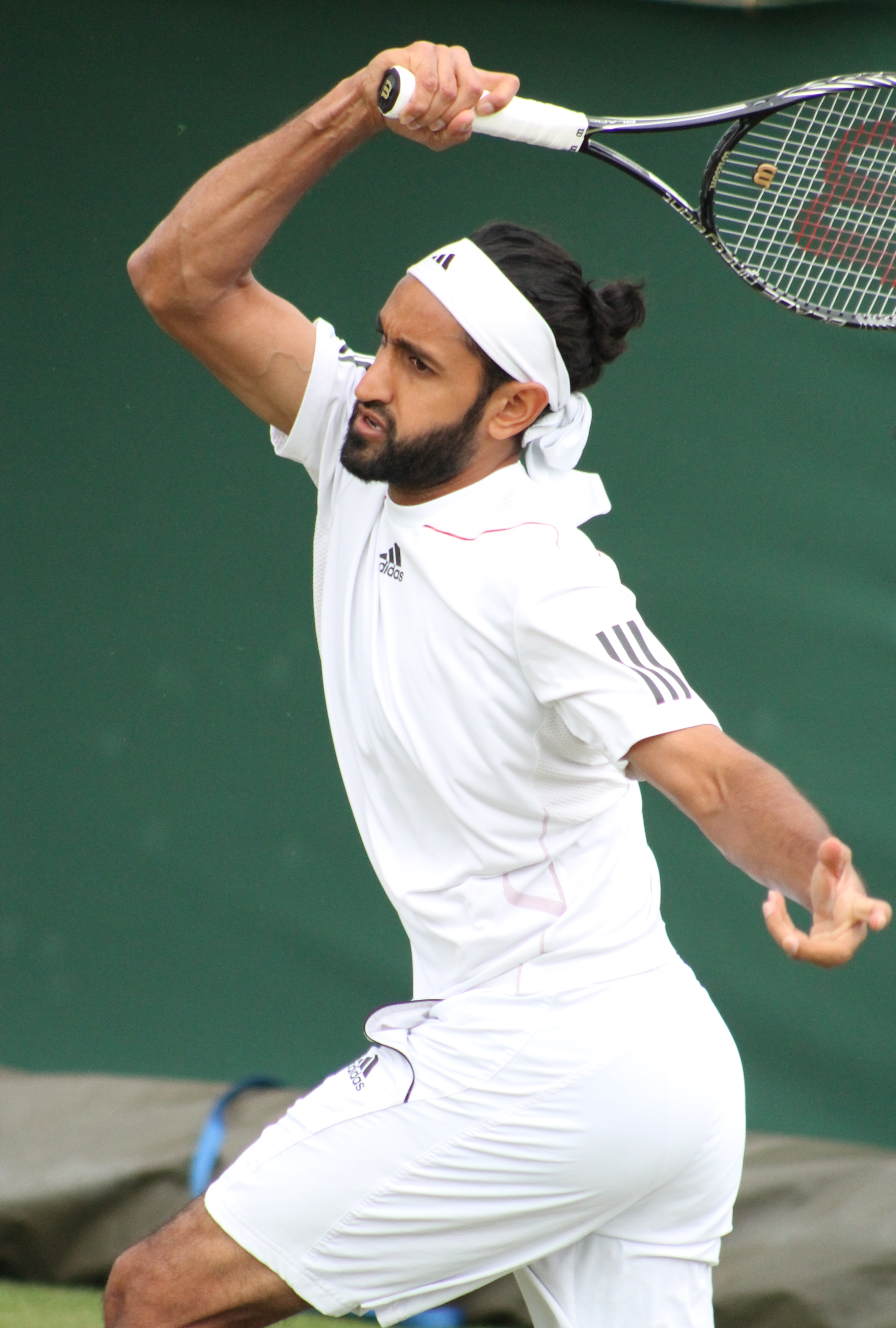 Shamasdin WMQ14 (17)